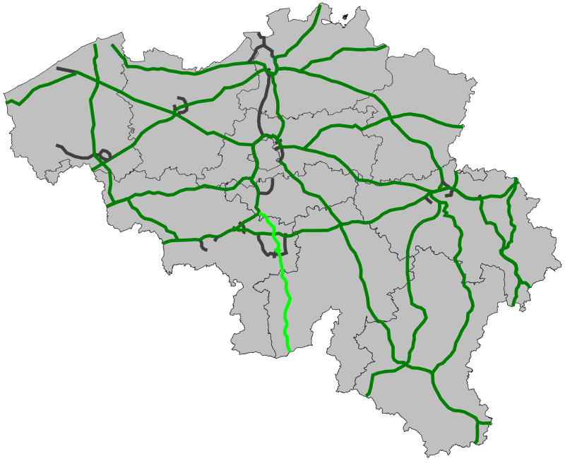 Traject Europese weg 420 door België